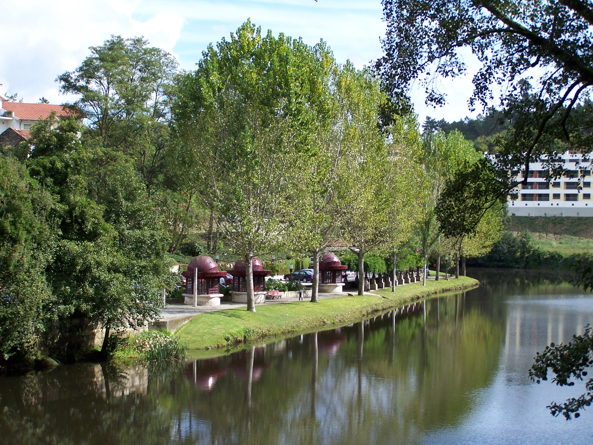 Termas de São Pedro do Sul (entre São Pedro do Sul e Vouzela), distrito de Viseu, Rio Vouga, Portugal.